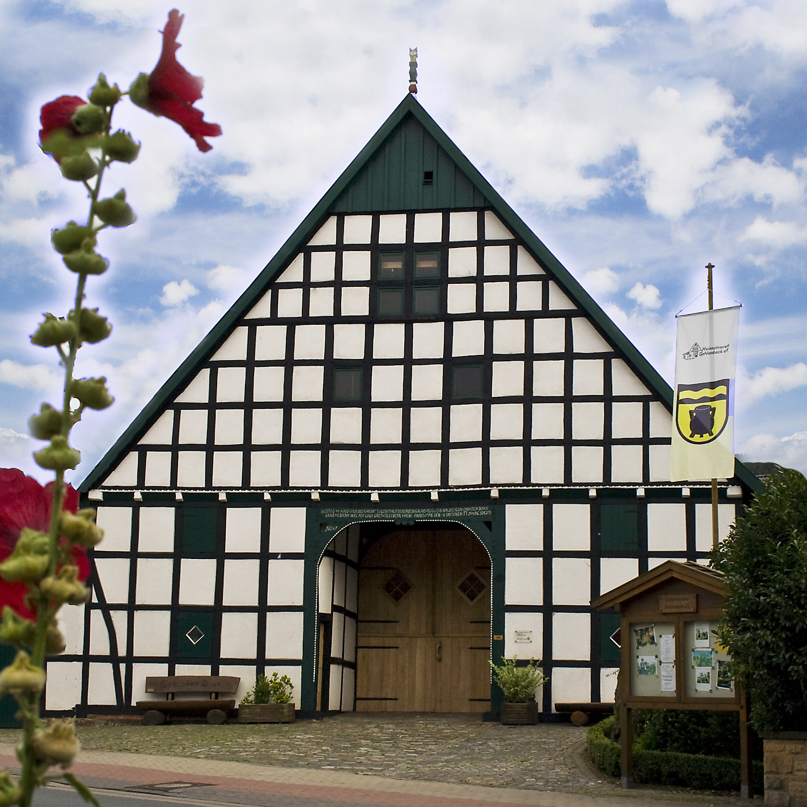 Fachwerkgiebel des Gehrmker Hius' (Nordseite) Das Bild ist nachbearbeitet (bedeckter Himmel durch blauen Wölkchen-Himmel ersetzt). This image shows a heritage building in Germany, located in the North Rhine-Westphalian city Lübbecke (no. 90).